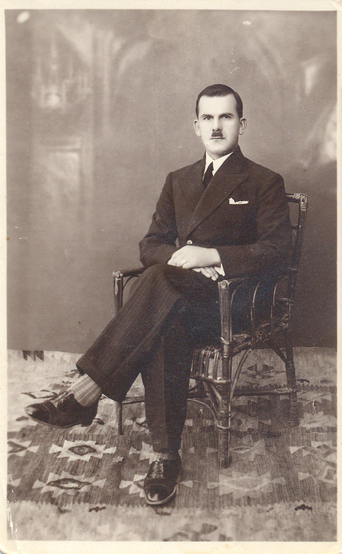 Srpski (latinica): Velimir Perisin Tomovic(otac Slobodanov) profesor knjizevnosti istorije